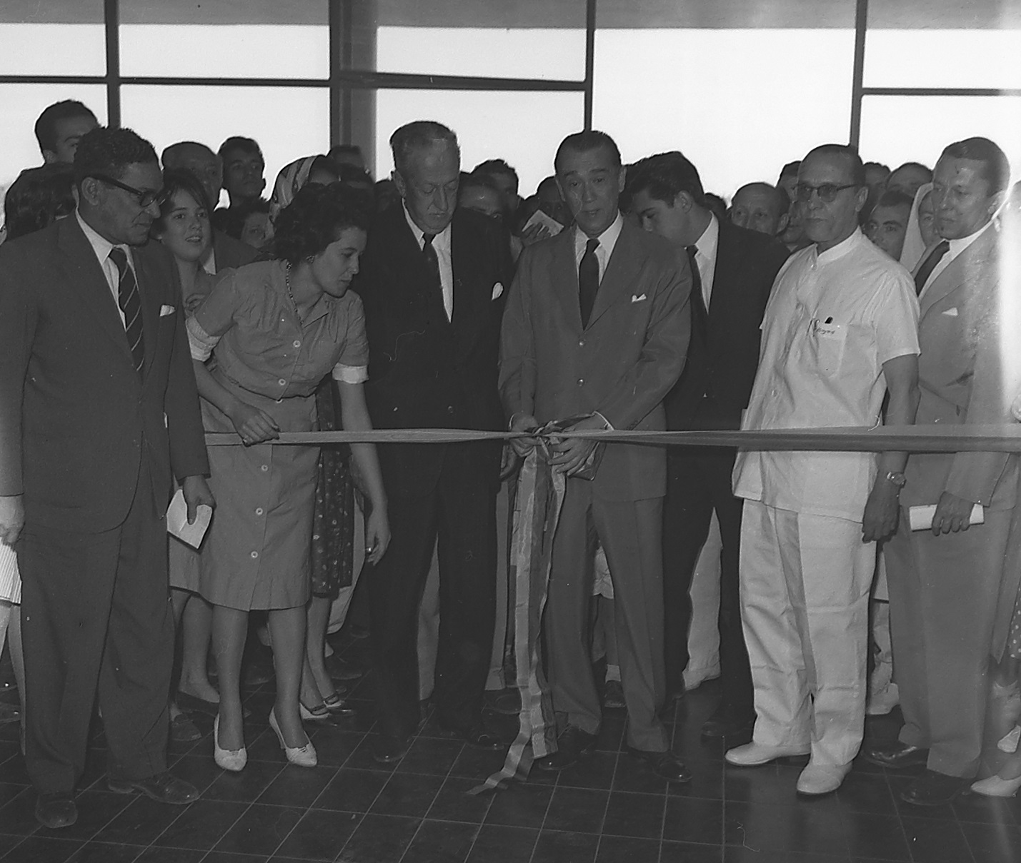 Imagem do Fundo Agência Nacional, do Arquivo Nacional